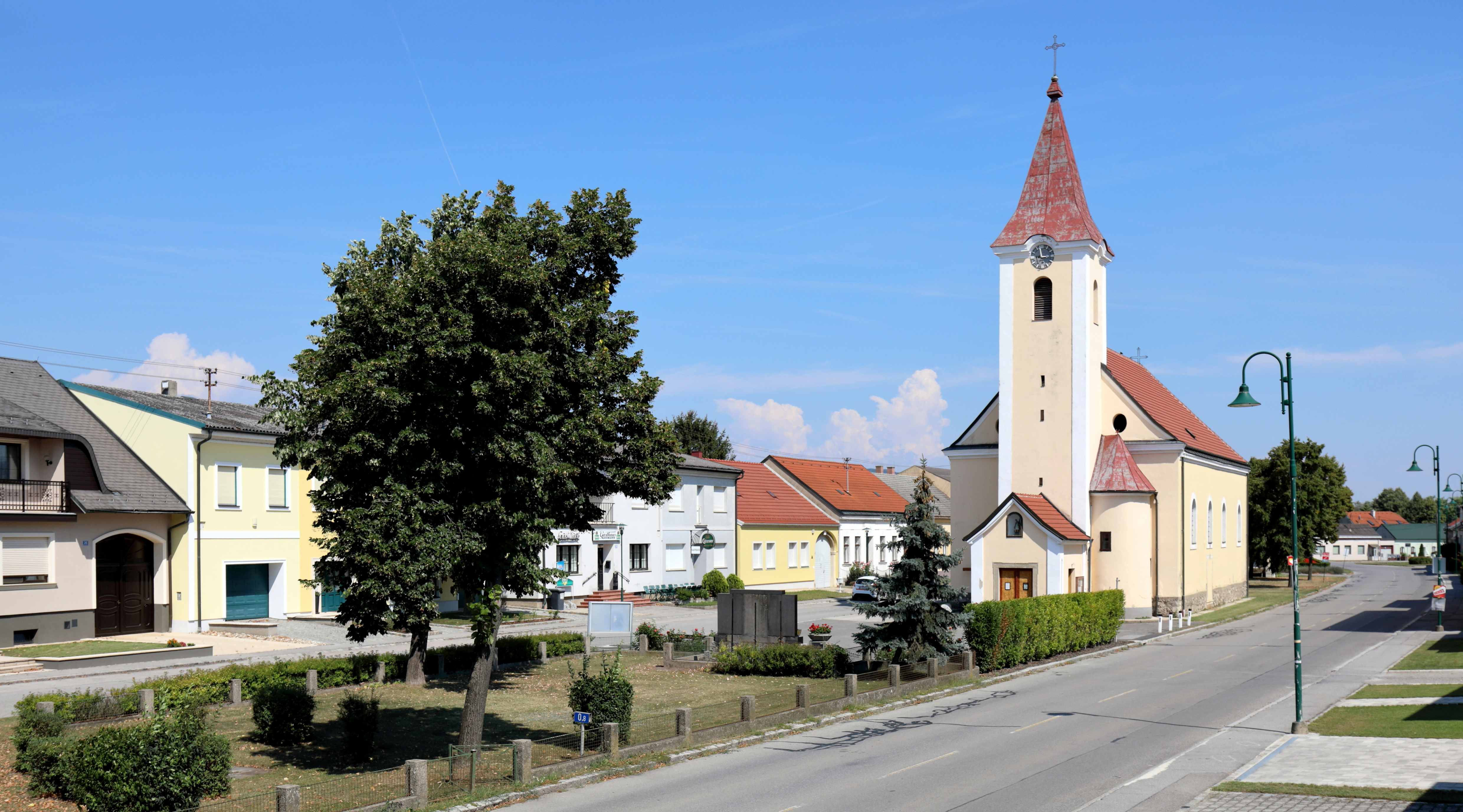 Das Ortszentrum der niederösterreichischen Marktgemeinde Engelhartstetten mit der röm.-kath. Pfarrkirche hl. Markus in der Angermitte. Der einfache barocke Sakralbau wurde in der 2. Hälfte des 18. Jahrhunderts errichtet.